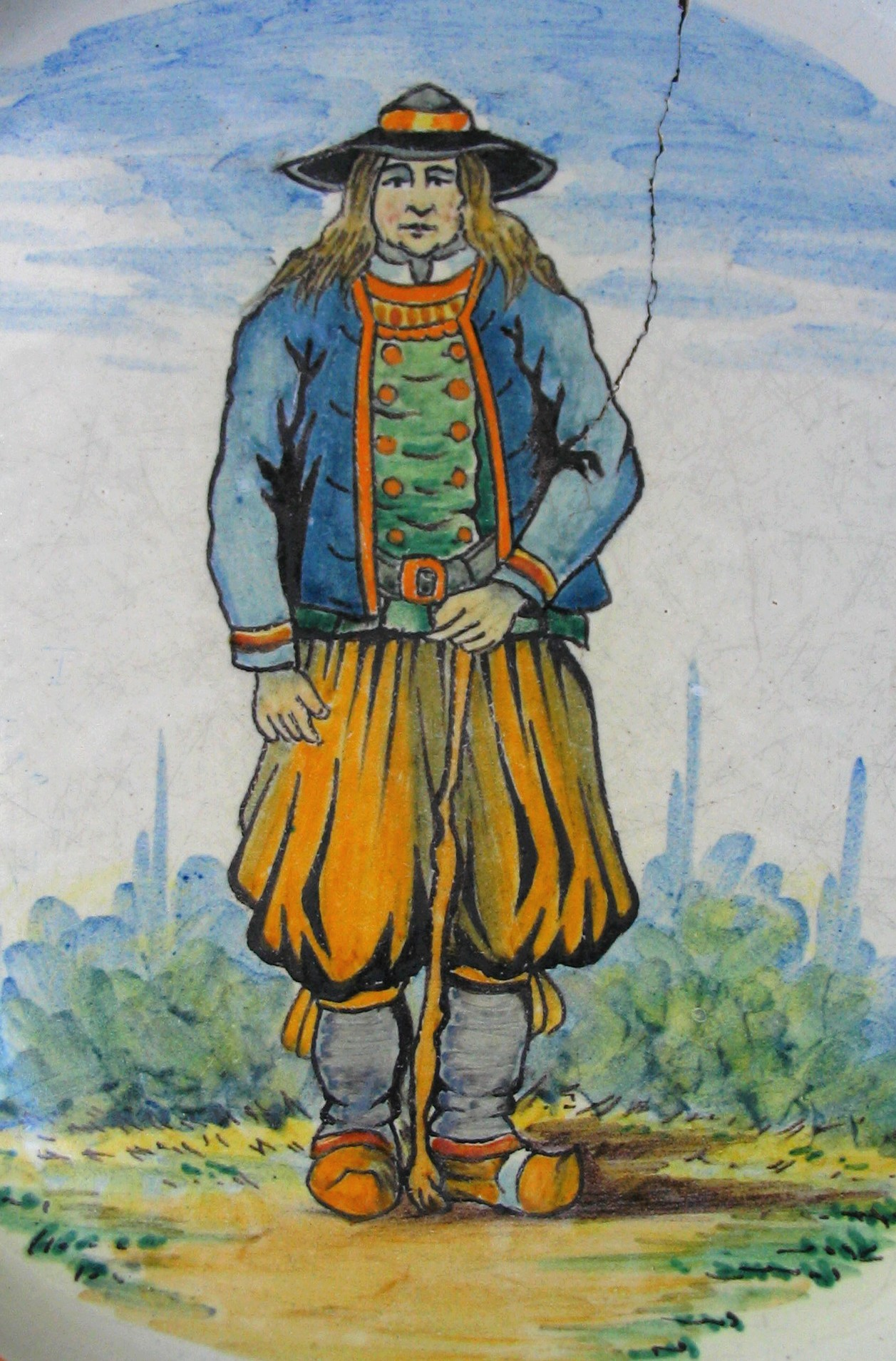 Décor au "Petit breton", Faïence de Quimper, signé Henriot vers 1910